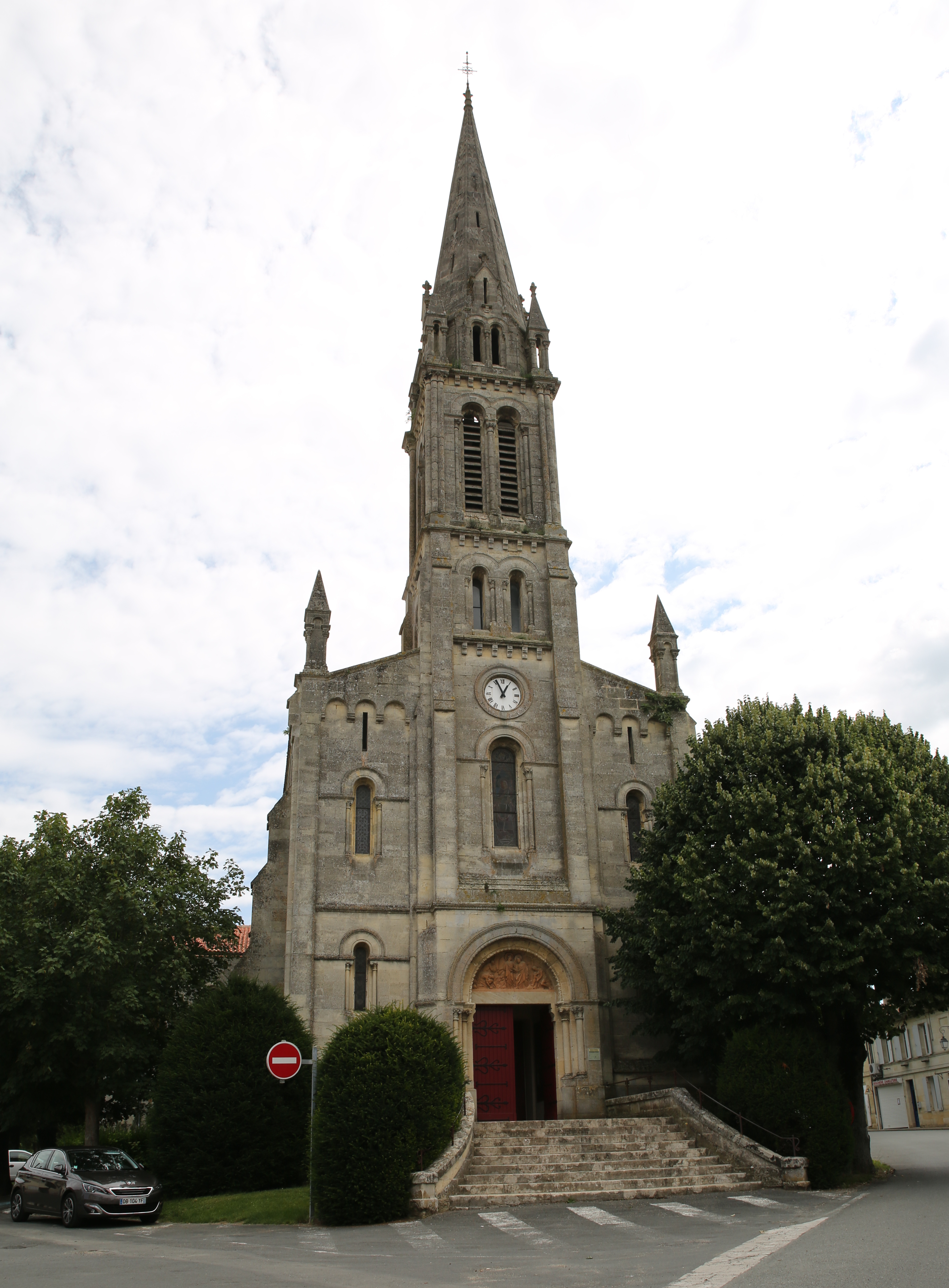 Quinsac Église